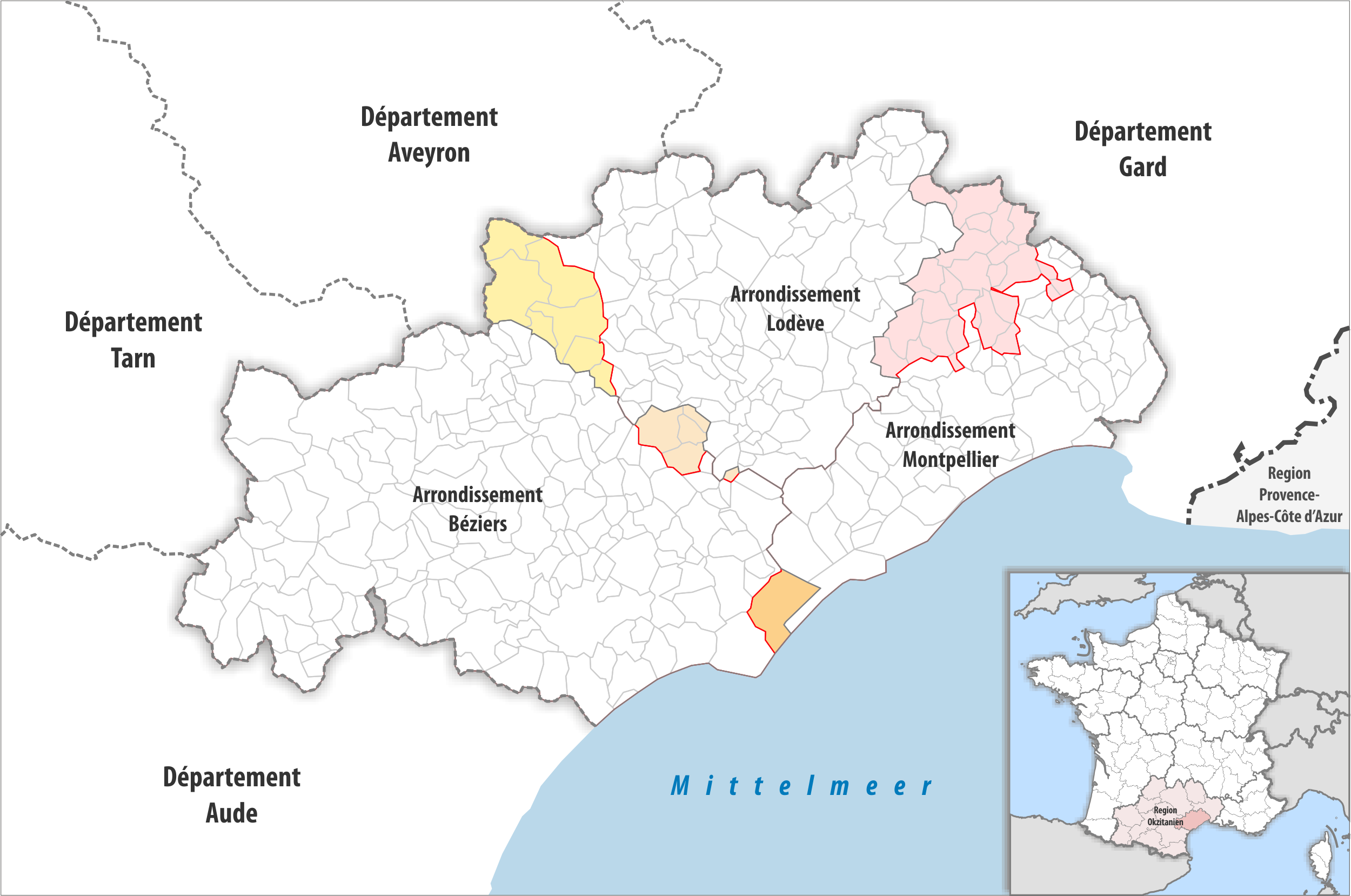 Arrondissements Anpassungen auf 2017 im Departement Hérault